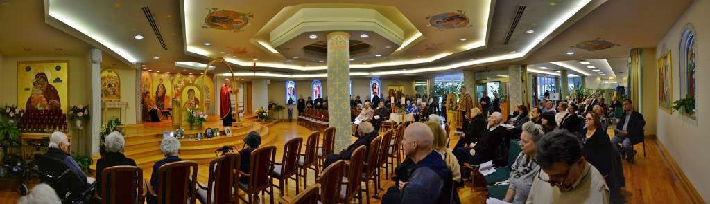 Українсько-канадський осередок опіки в Торонто, капличка